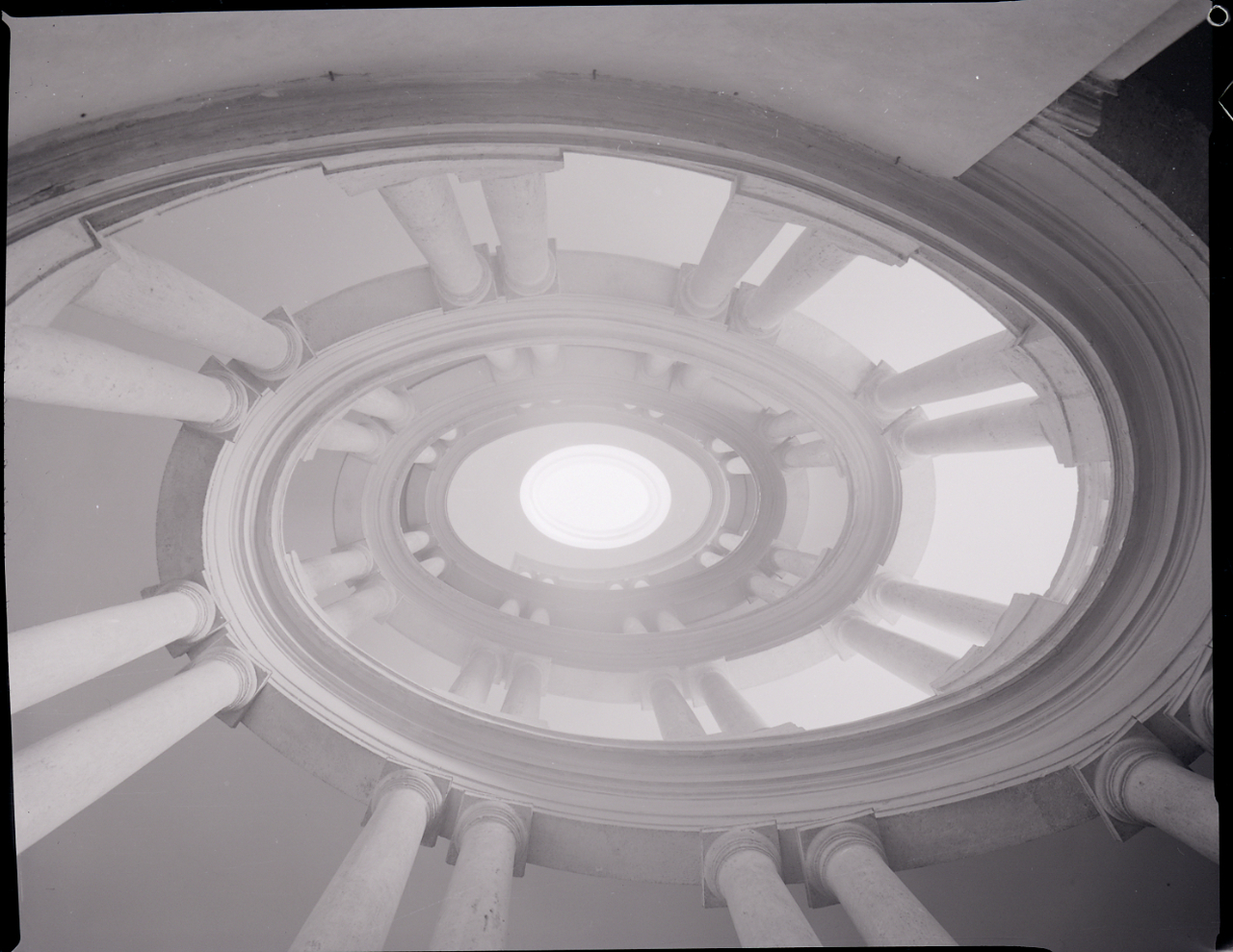 Servizio fotografico : Roma, 1962 / Paolo Monti. - Buste: 2, Fototipi: 2 : Negativo b/n, gelatina bromuro d'argento/ pellicola ; 10x12. - ((Serie costituita da 2 buste sciolte di negativi identificati con una doppia numerazione (da 45096 a 45119): 25035, 25058. - Occasione: Documentazione del Palazzo del Quirinale per la Signora Chiara Briganti. - Fonte: Agenda di Paolo Monti: Foto Leica 1 / 1-51 verde, 1-110 nera (1958-1963), presso Archivio Paolo Monti. - Fonte: Fogli pinzati di Paolo Monti: I. Carteggi/ Quirinale (1962), presso Archivio Paolo Monti. Elenco dattiloscritto dettagliato delle opere d'arte riprodotte suddiviso per tipologia e autore; elenco dettagliato delle riprese effettuate con soggetto e numero di inventario suddiviso per macrocategorie di soggetti. - Fonte: Rubrica di Paolo Monti: Archivio fino 1-4-1961/ 31-3-1963 (1961-1963), presso Archivio Paolo Monti